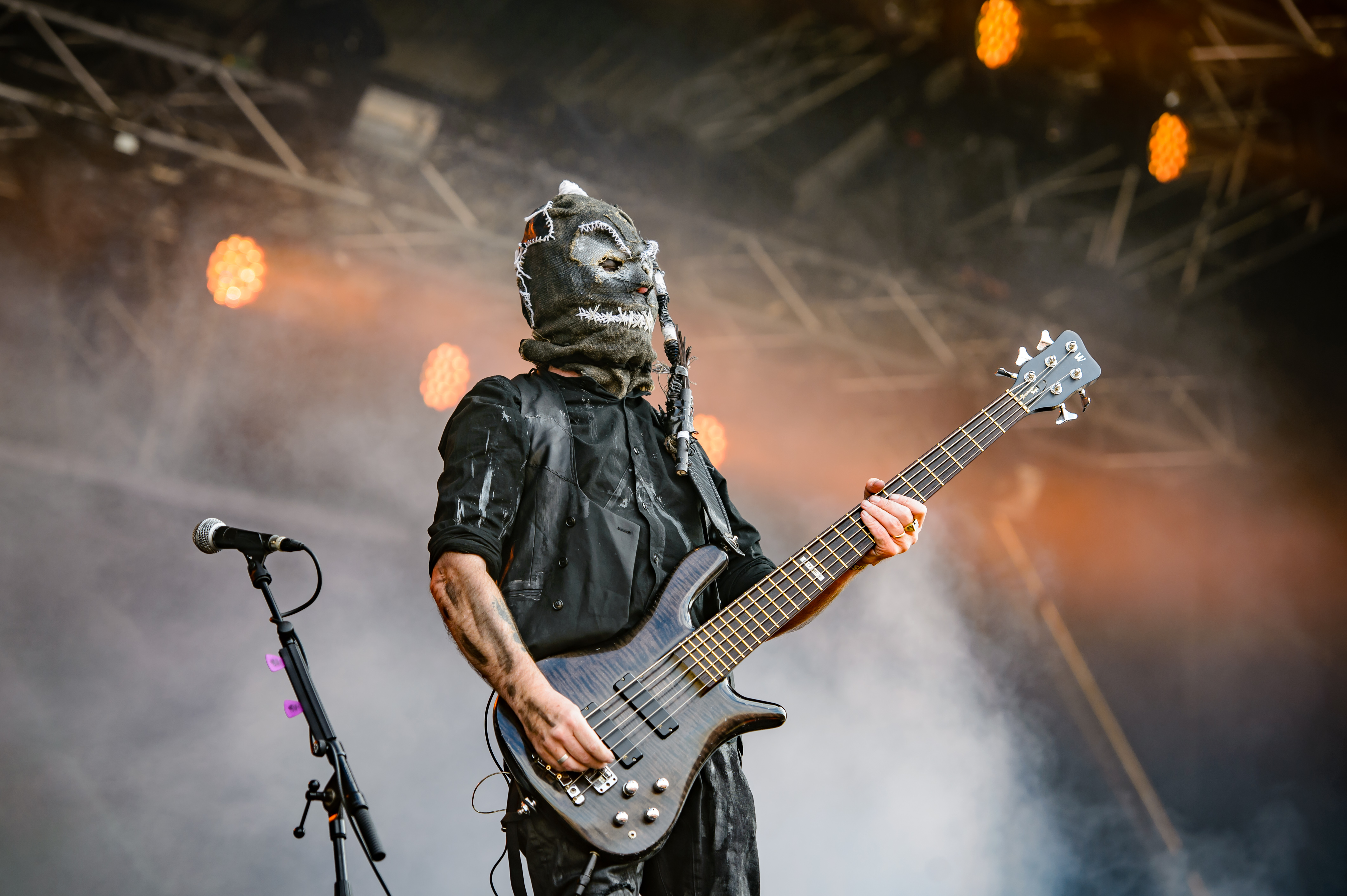 'RockHarz Open Air 2016; Ballenstedt': 'Hämatom'